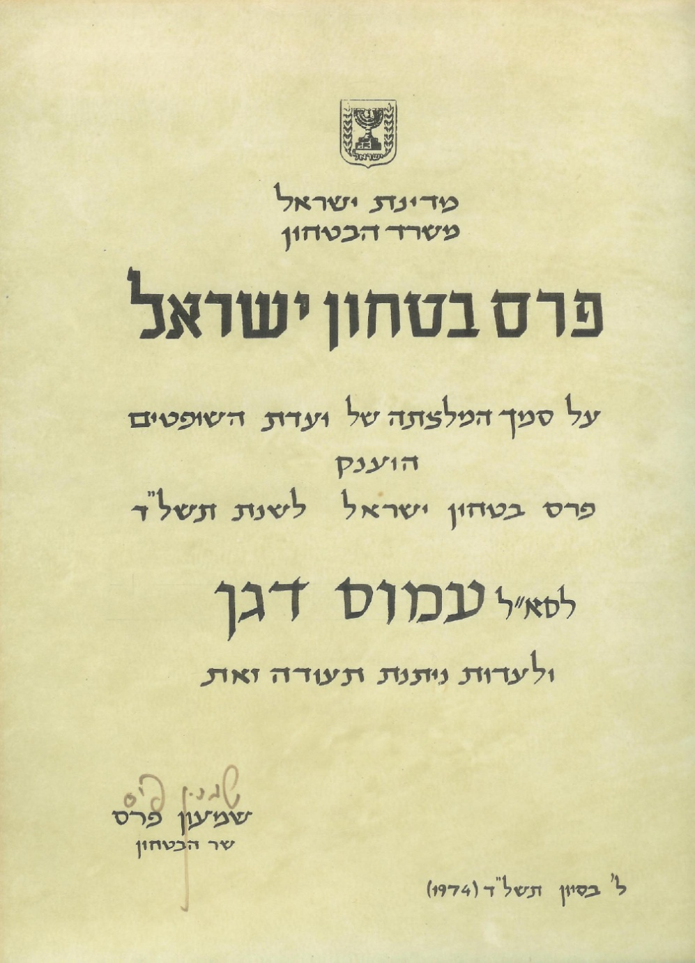 תעודה פרס ביטחון ישראל עמוס דגן